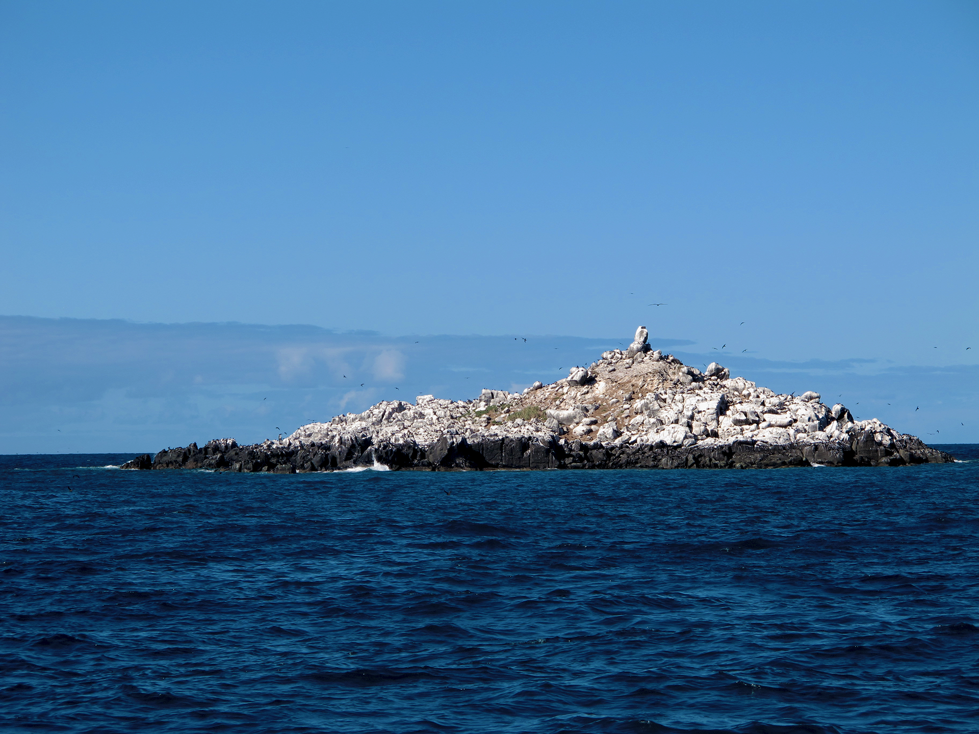 Vista da ilha principal do arquipélago de Abrolhos